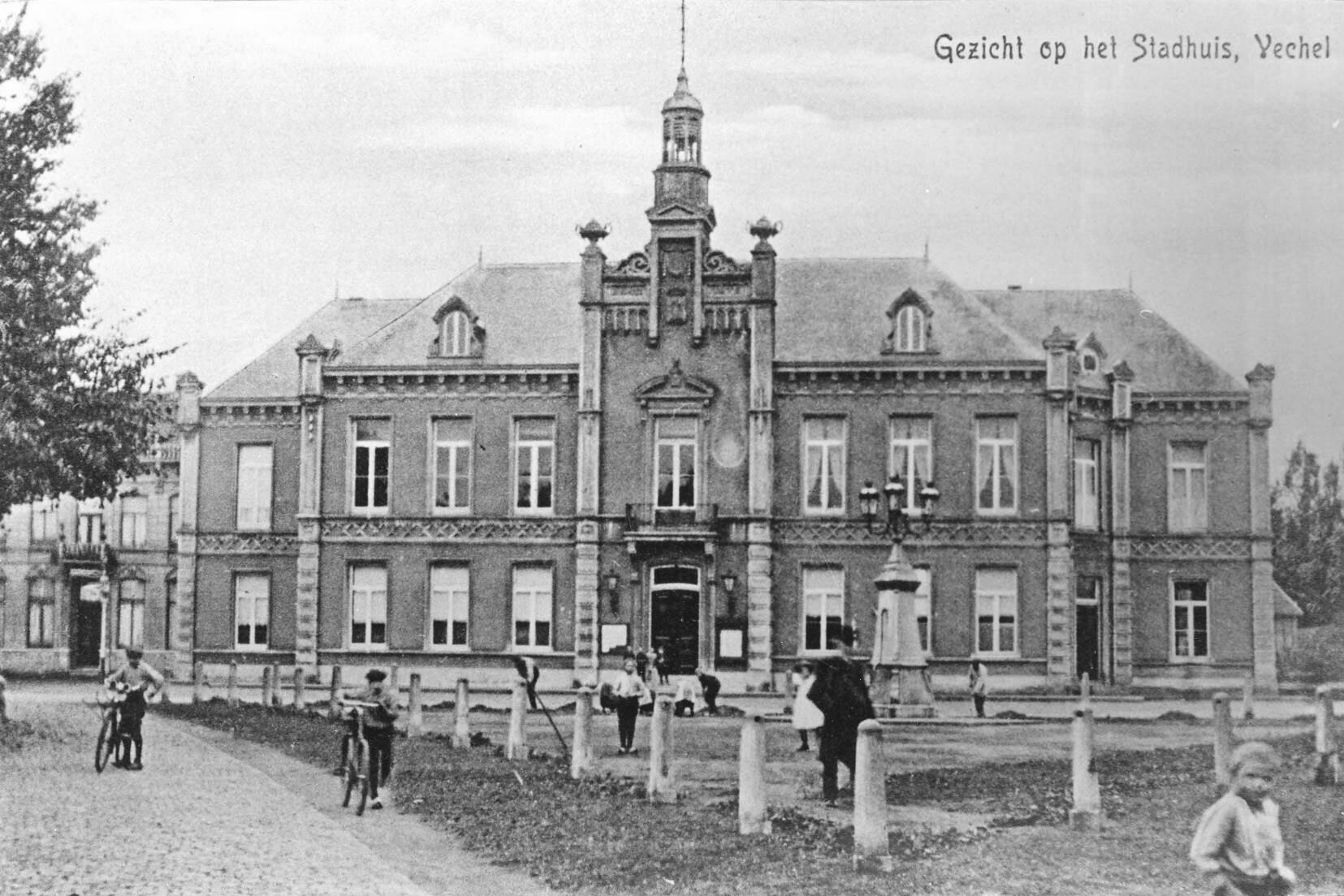 Oude raadhuis & kantongerecht aan de Markt in Veghel